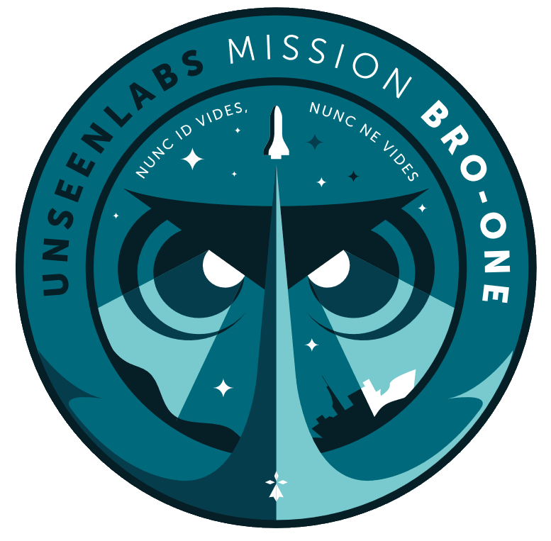 Le patch bro-1 du premier lancement d'UnseenLabs